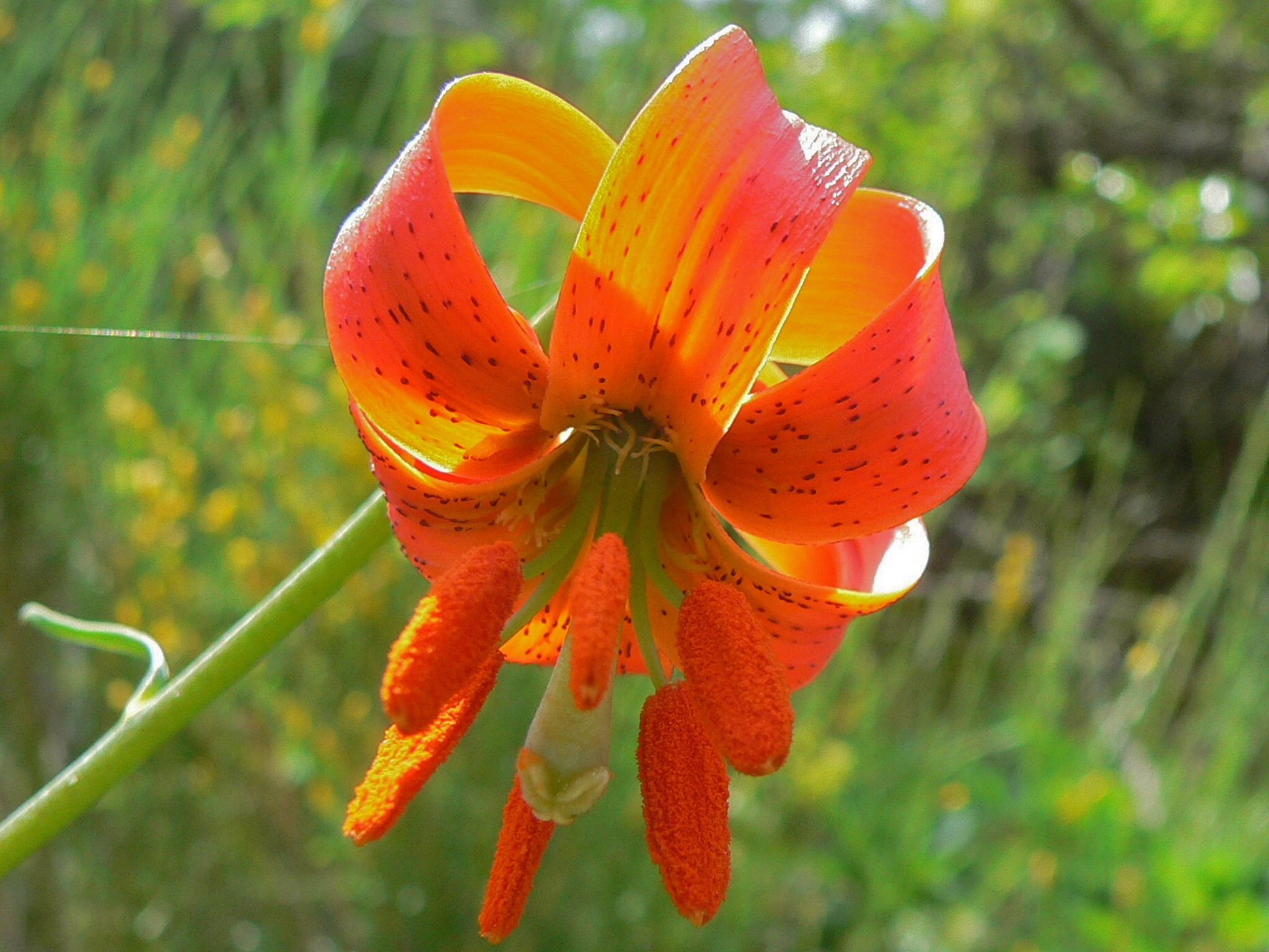 Sigale, Alpes-Maritimes, FRANCE